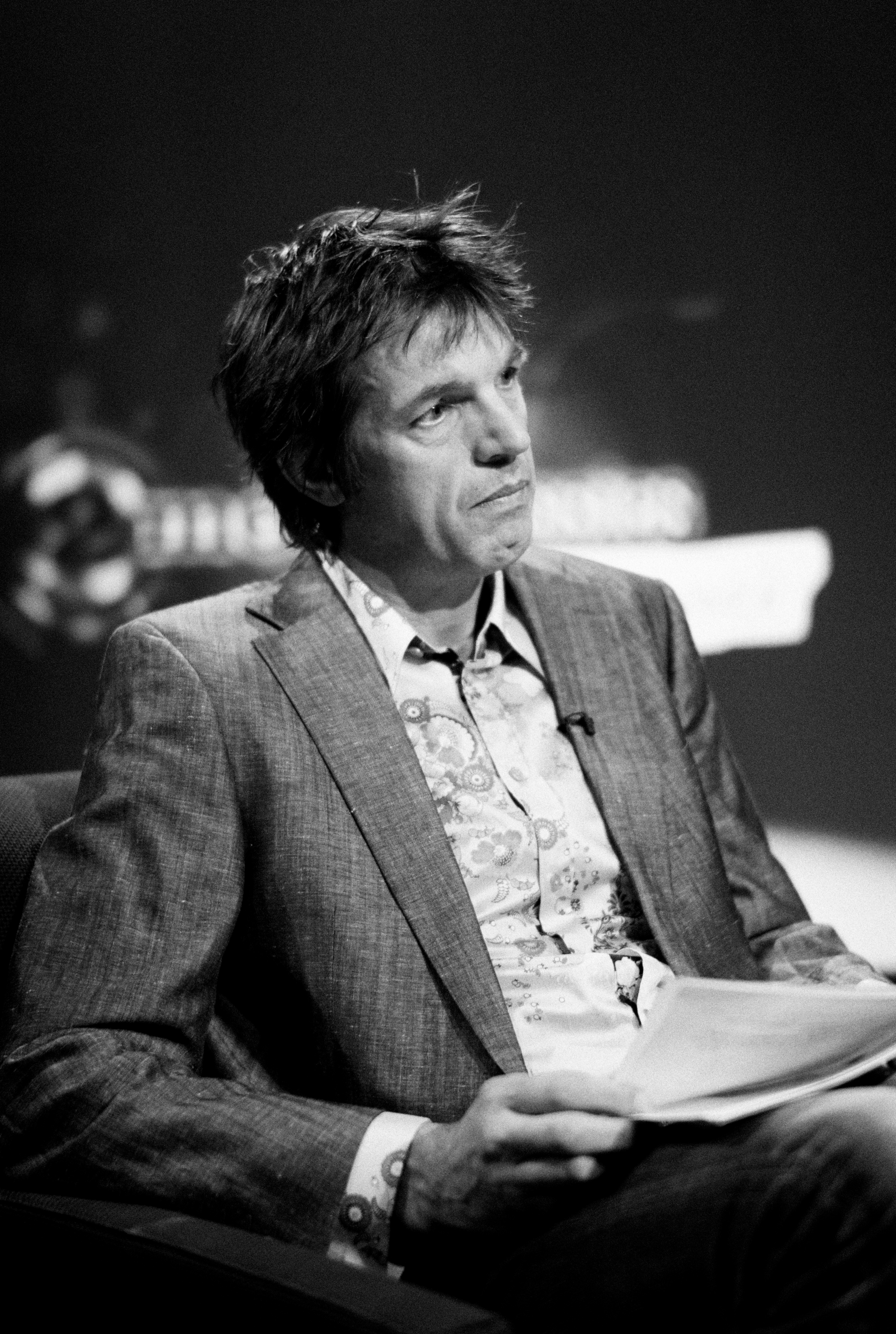 Muziekkenner, radiomaker en tv-presentator Jan Douwe Kroeske